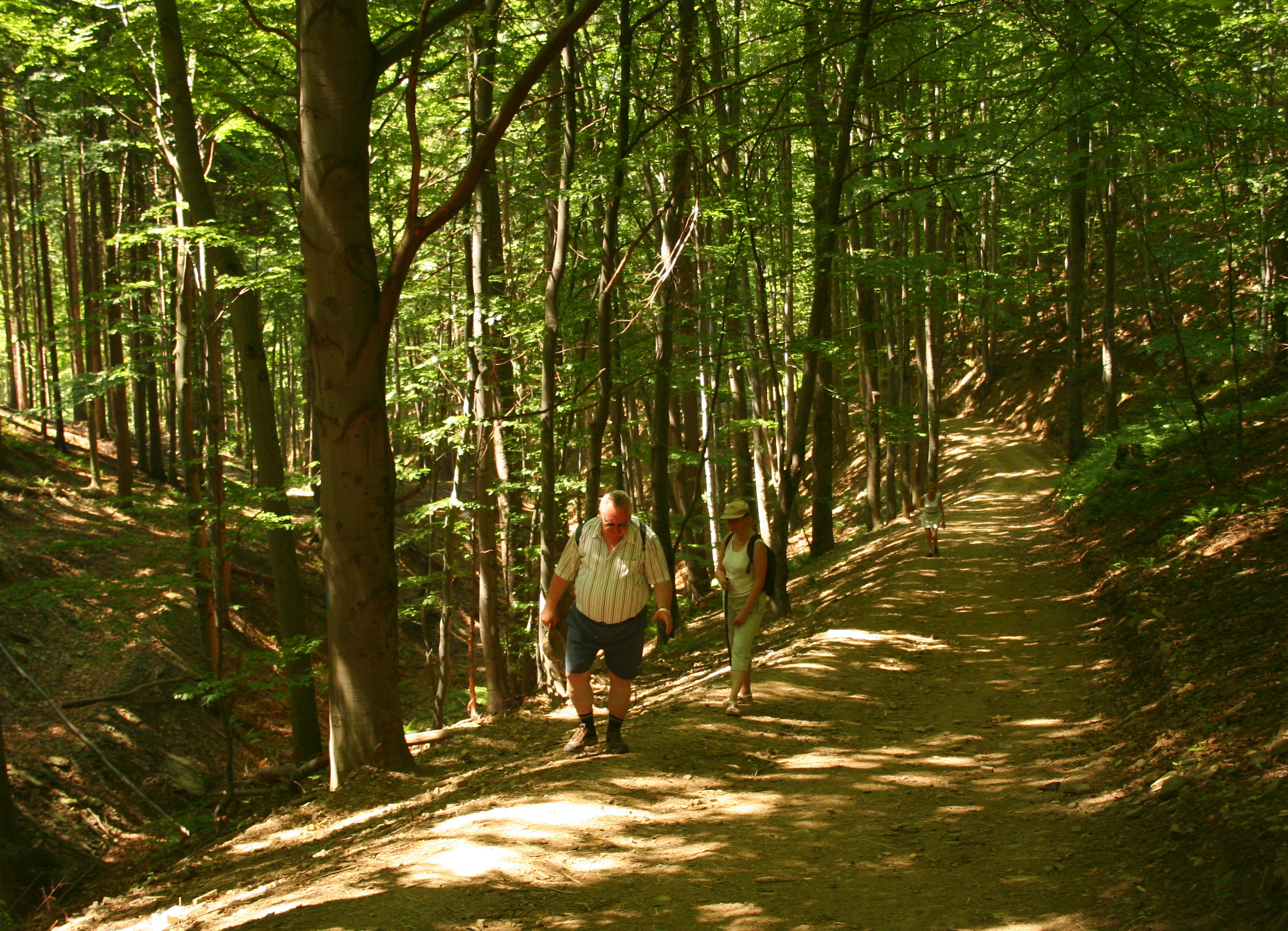 Ustroń -szlak czerwony na Równicę